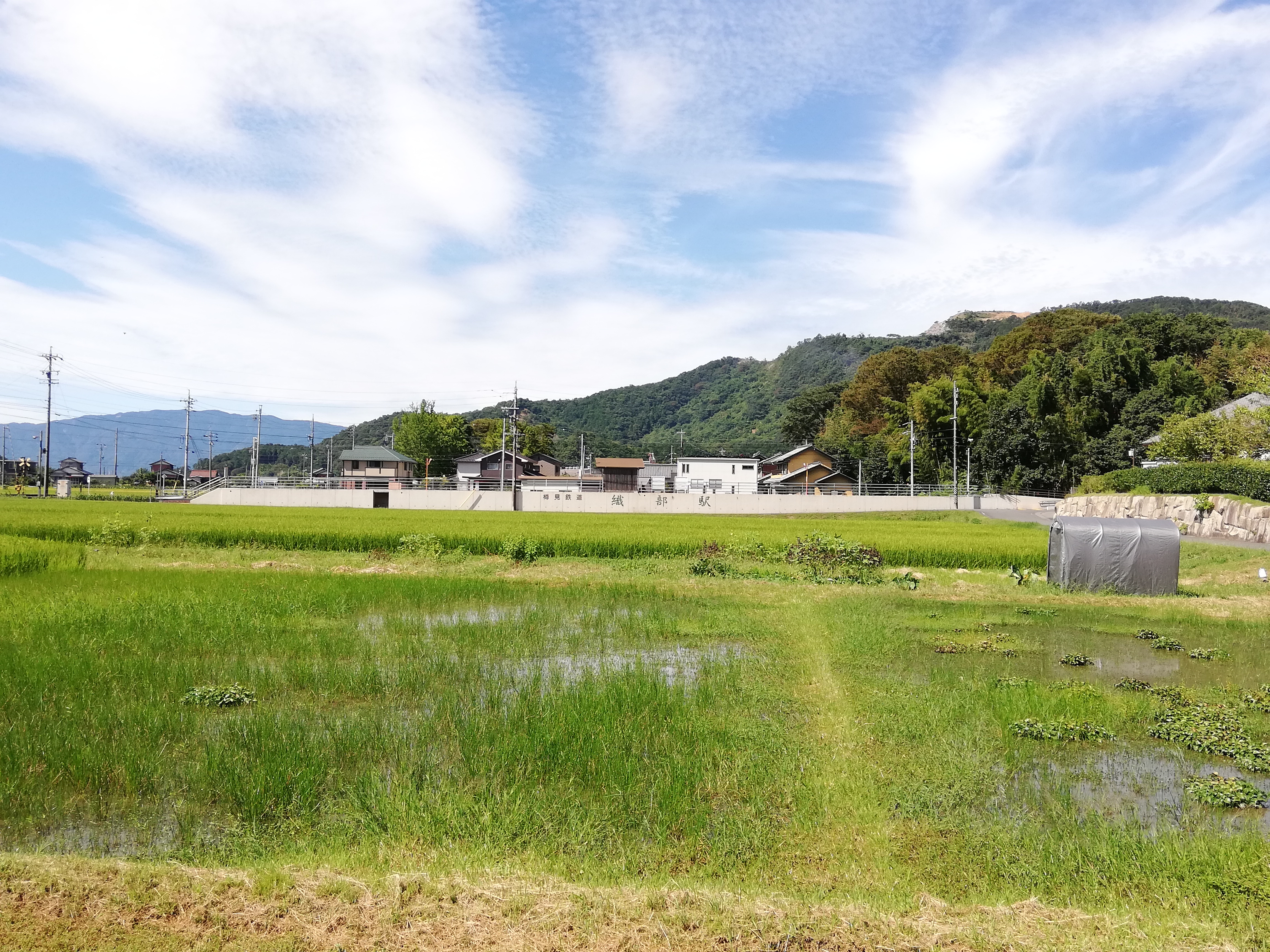 樽見線の織部駅。